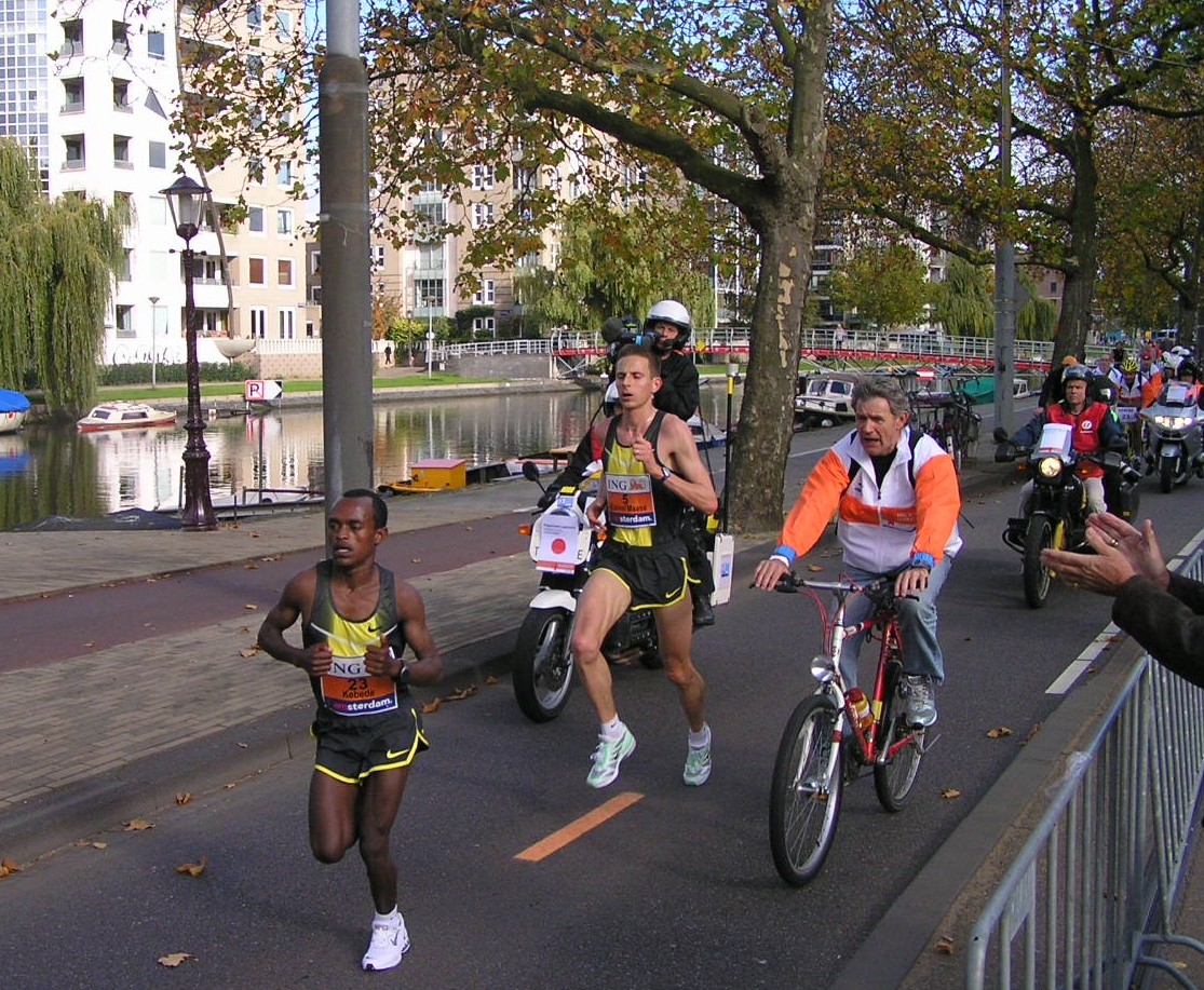 Kamiel Maase op weg naar een nieuw Nederlands record tijdens de Marathon van Amsterdam in 2007, vlak na het 35 km-punt. Naast hem, op de fiets, coach Bram Wassenaar. Links de Ethiopiër Tsegaye Kebede.